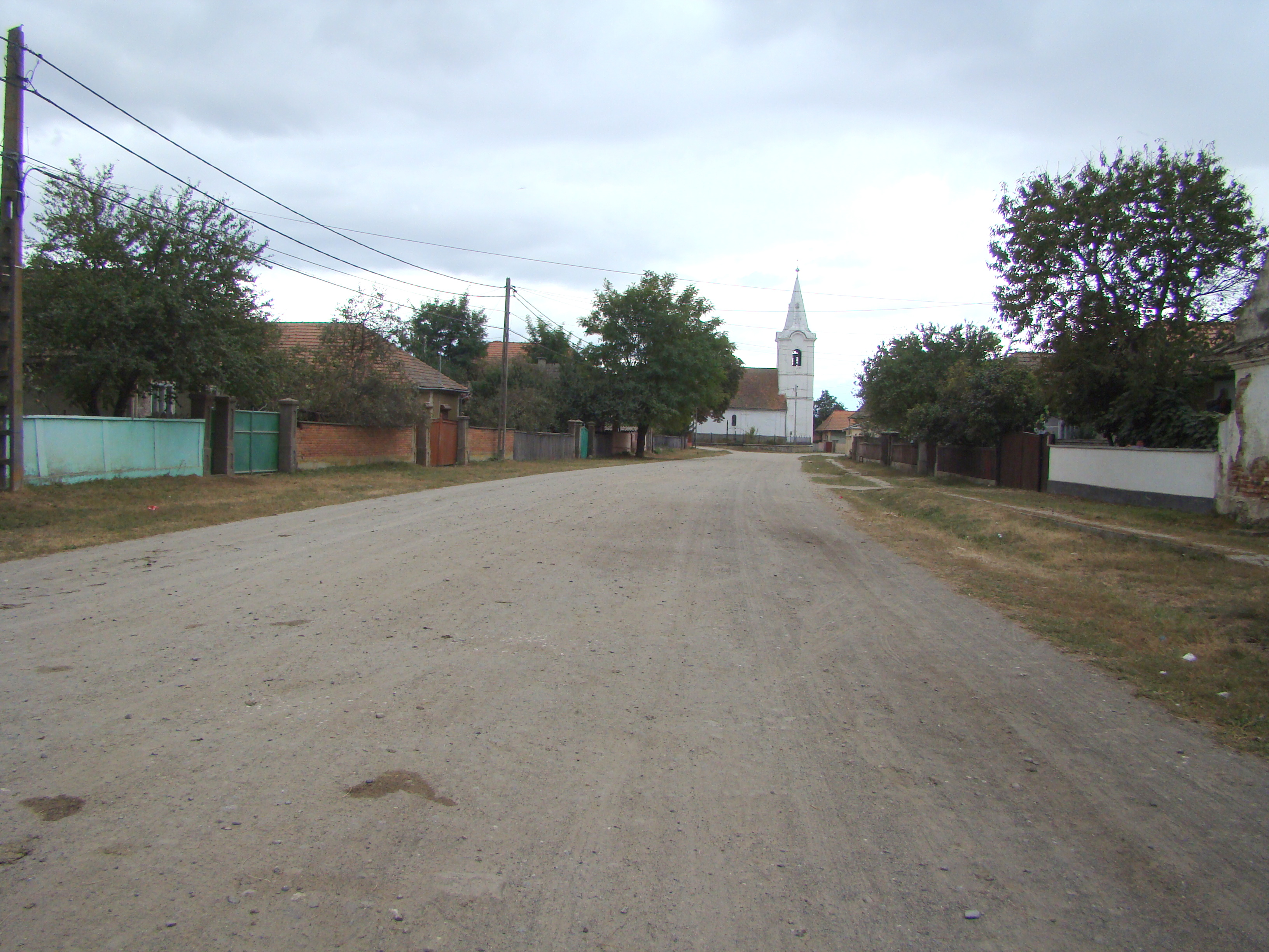 Biserica reformată, sat Mărtineni; comuna Catalina 66 sec. XV, transf. sec. XVIII - XIX, turn-clopotniță 1778